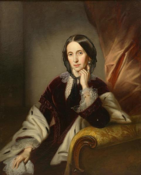 Шипова Дарья Алексеевна (1811-1865), дочь Алексея Матвеевича Окулова.